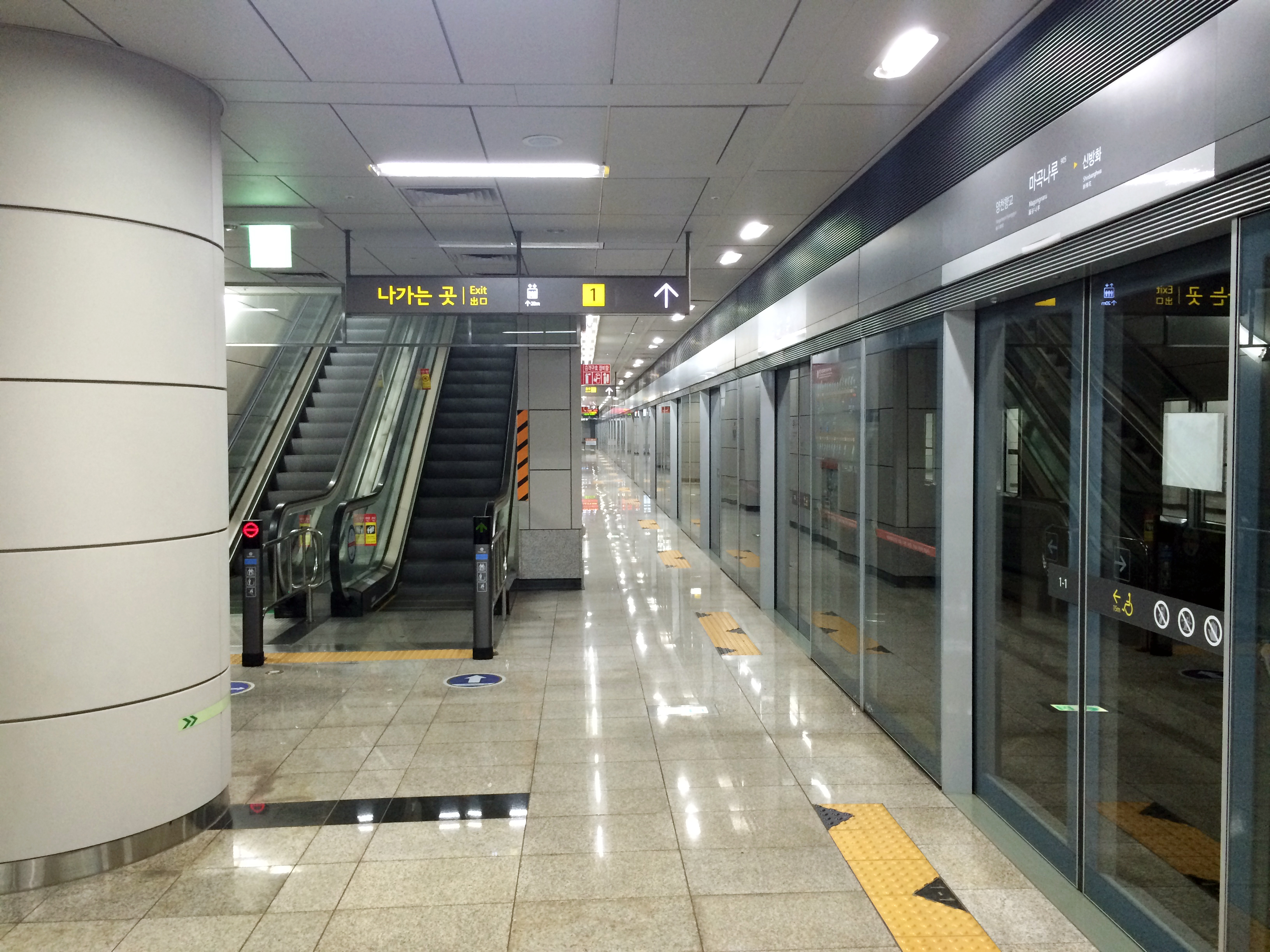 마곡나루역 승강장